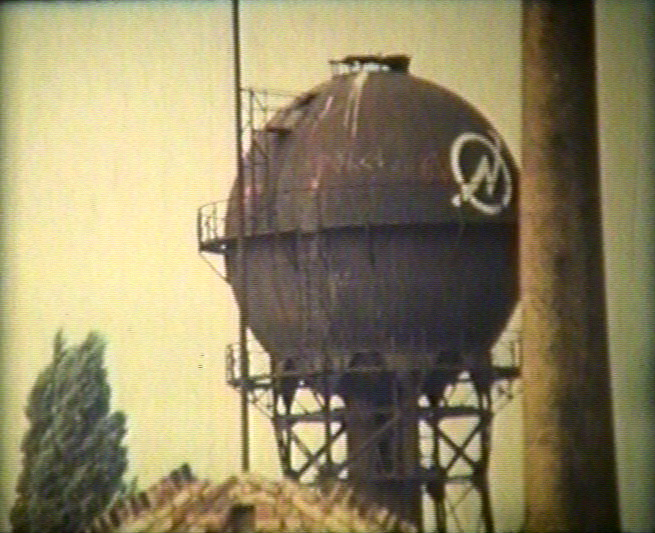 Wasserturm auf dem Gelände des Anhalter Güterbahnhof 1981. Heute Teil des Museum für Verkehr und Technik in Berlin. Im Turm war Anfang der 1980er Jahre ein Radiosender der Hausbesetzer versteckt.